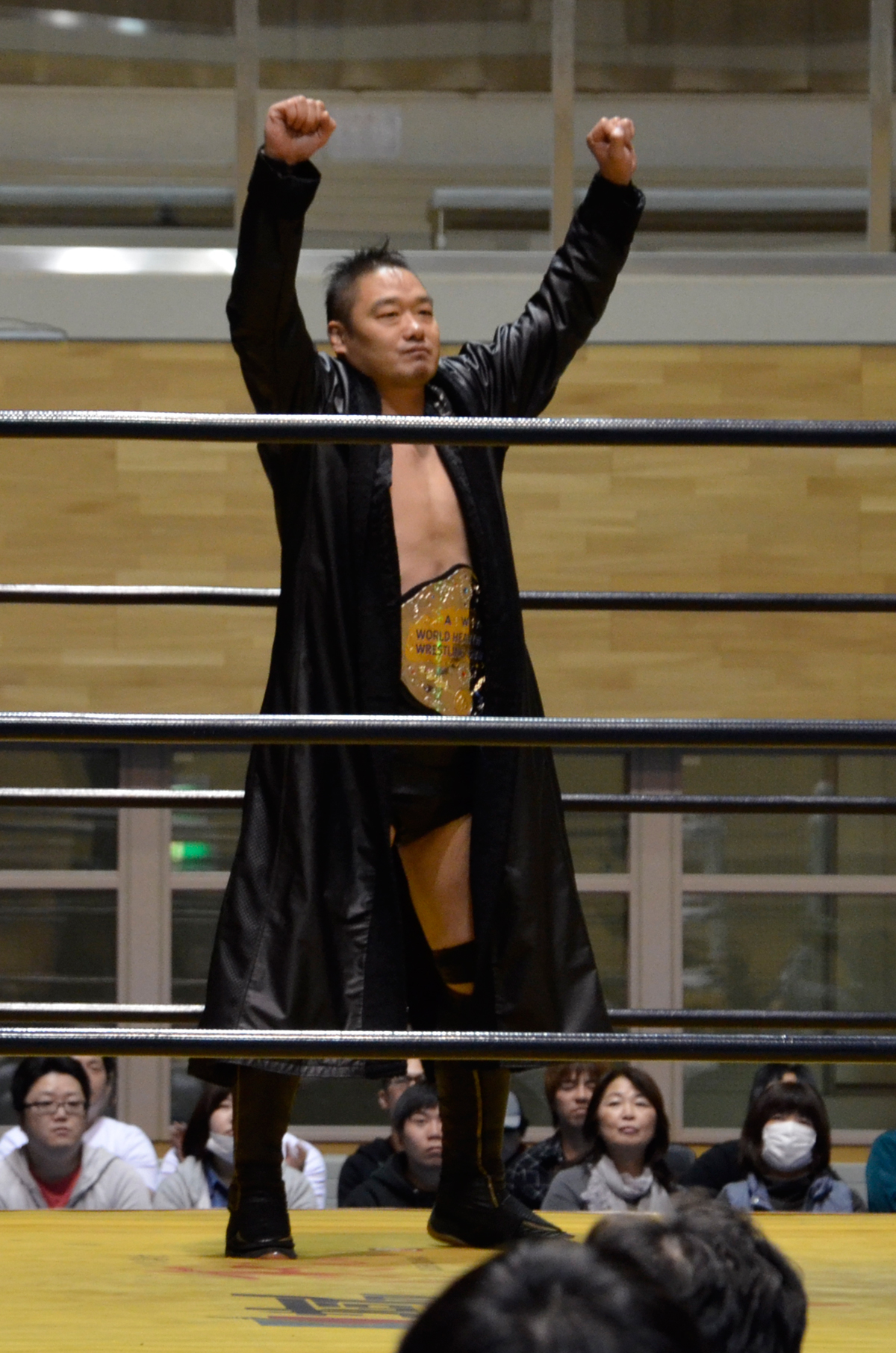 佐藤耕平選手